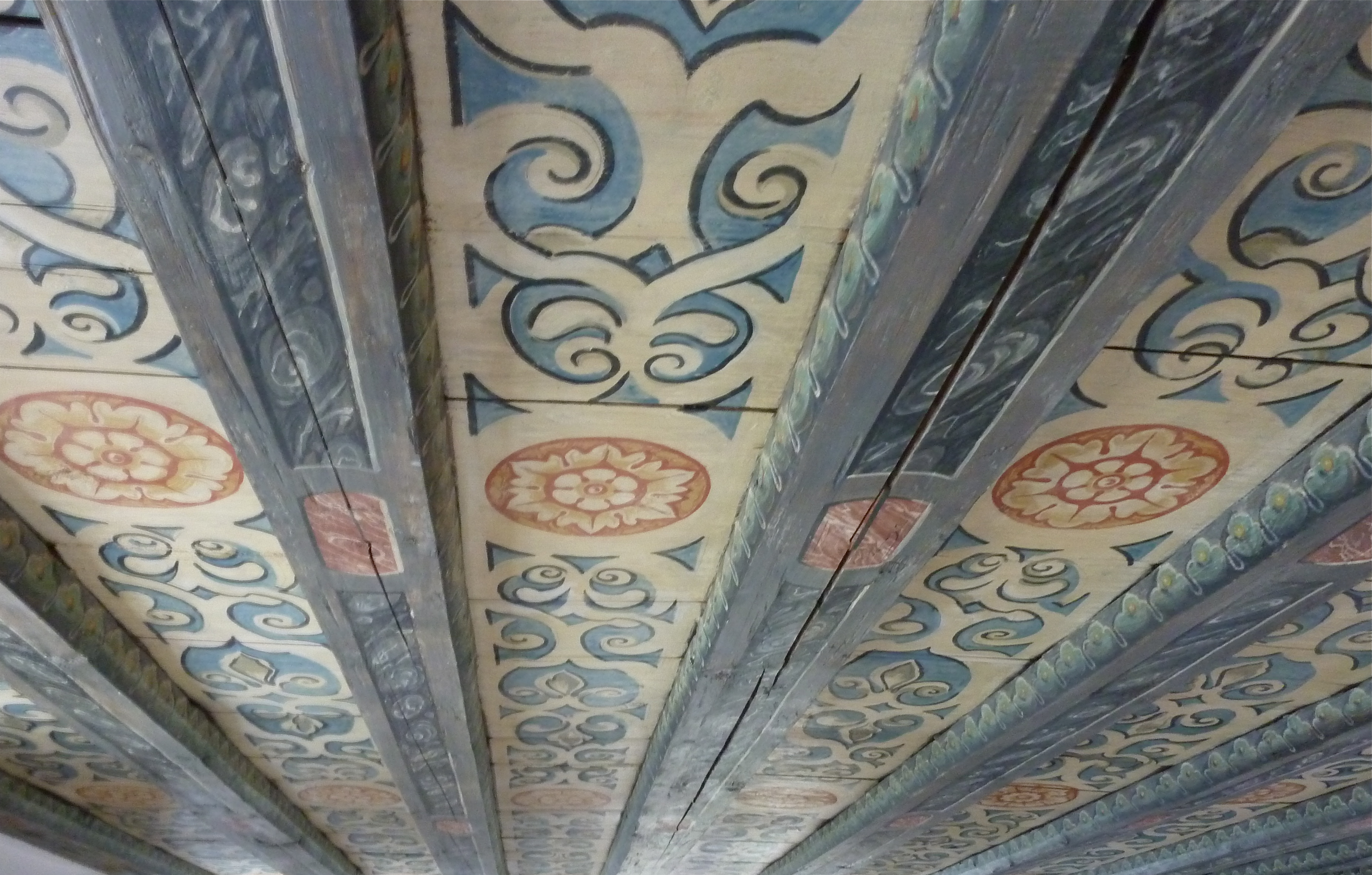 Traubenberg (Zollikon): Decke im grossen Wohnzimmer